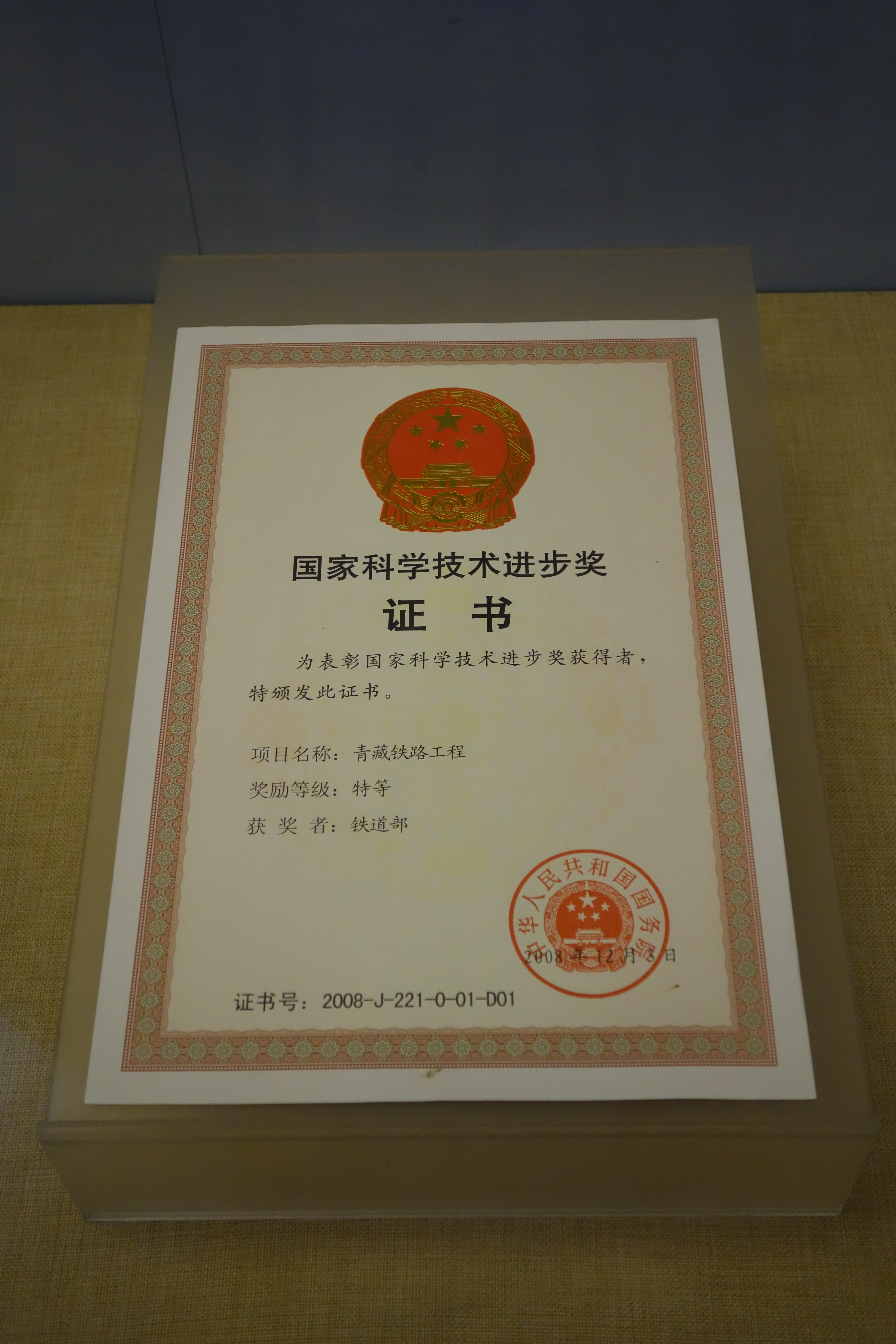 青藏铁路科技进步奖奖状